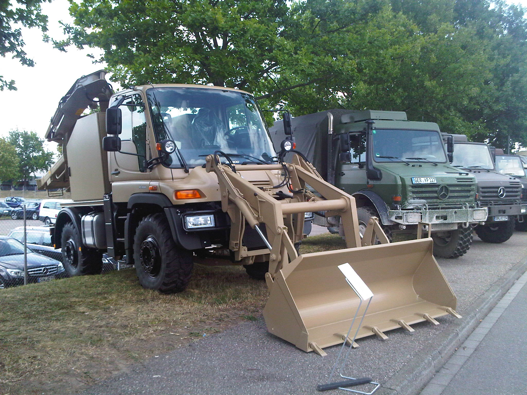 60 Jahre Unimog - Wörth 2011 040